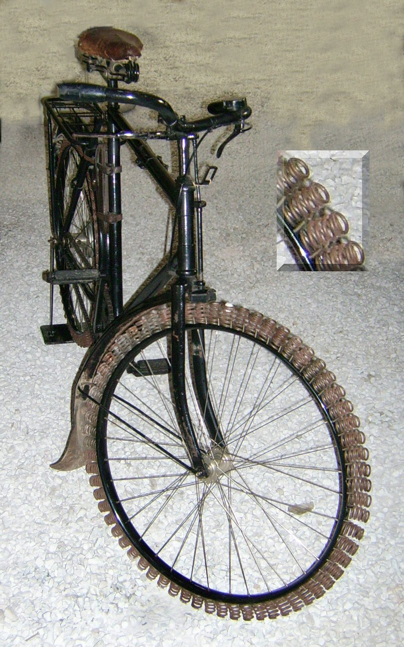 Ersatz für Fahrradmantel im 1. Weltkrieg als Bausatz an einem Schweizer Ordonanzrad Model 05